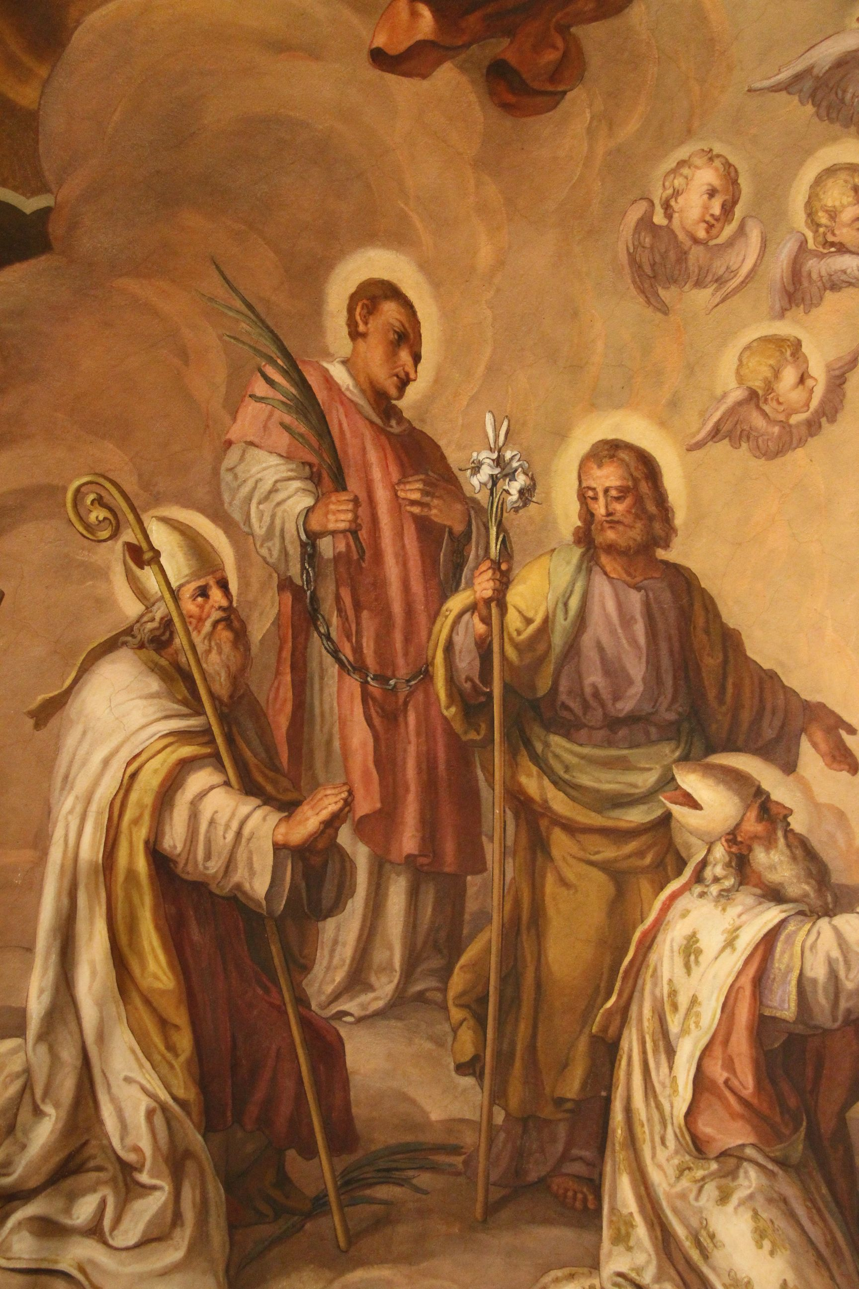 Freska v cerkvi sv. Petra, Ljubljana.